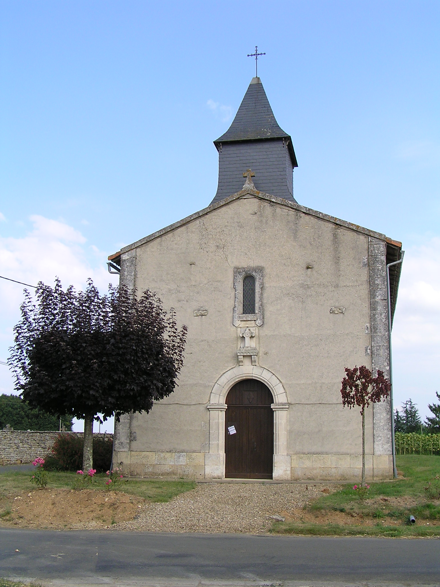 église de La Chèvrerie